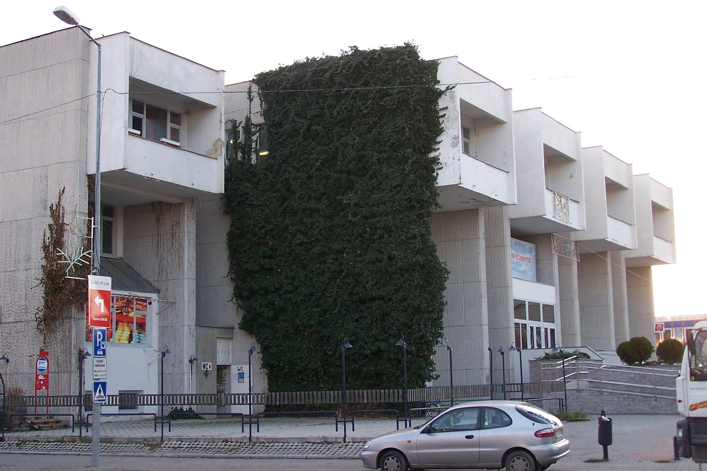 Mks_v_DS_celkový_náhľad_na_objekt